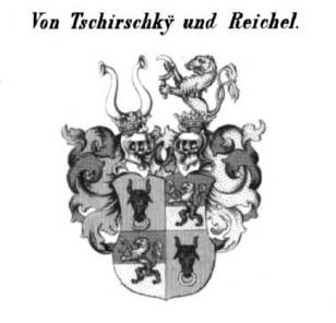 Wappen der Familie von Tschirschky und Reichel